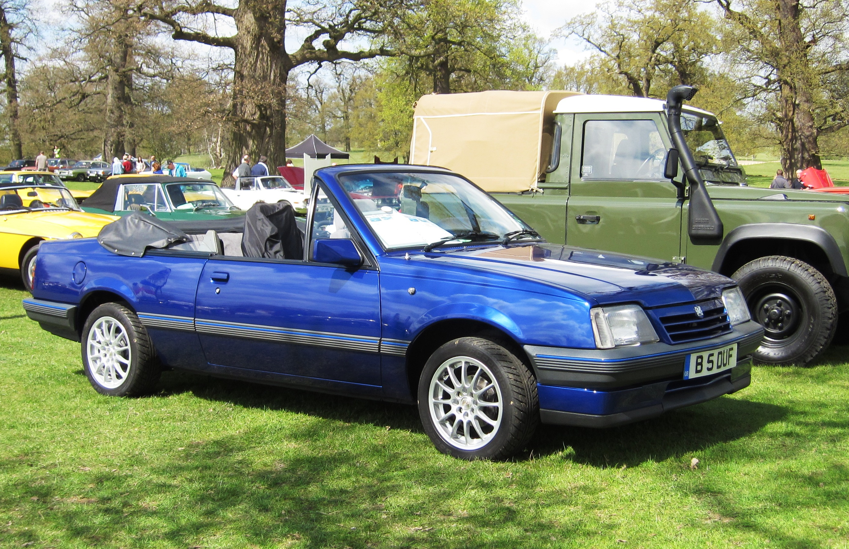 Vauxhall Cavalier cabrio 1986